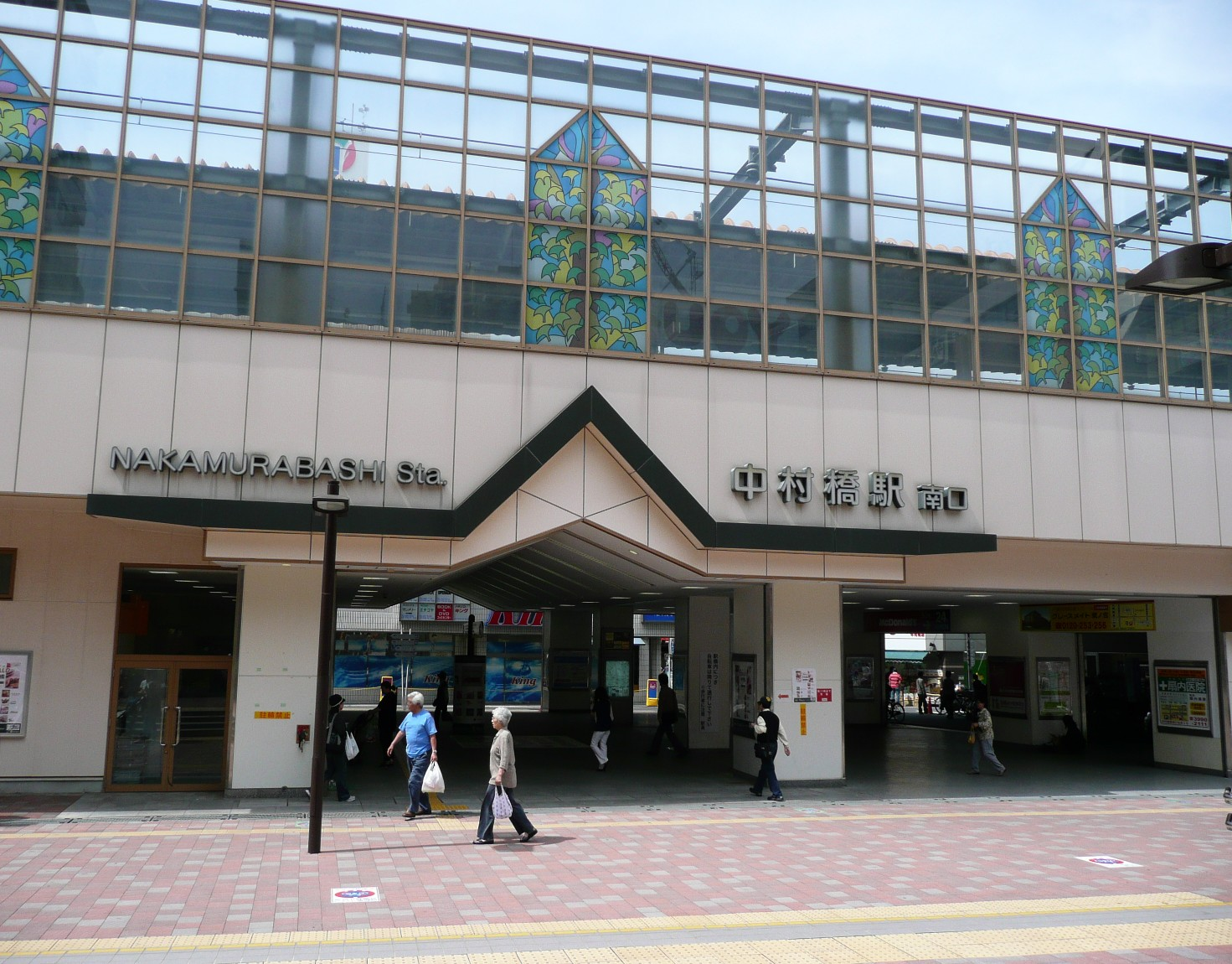 中村橋駅…南口